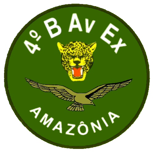 Bolacha do 4º batalhão de Aviação do Exército